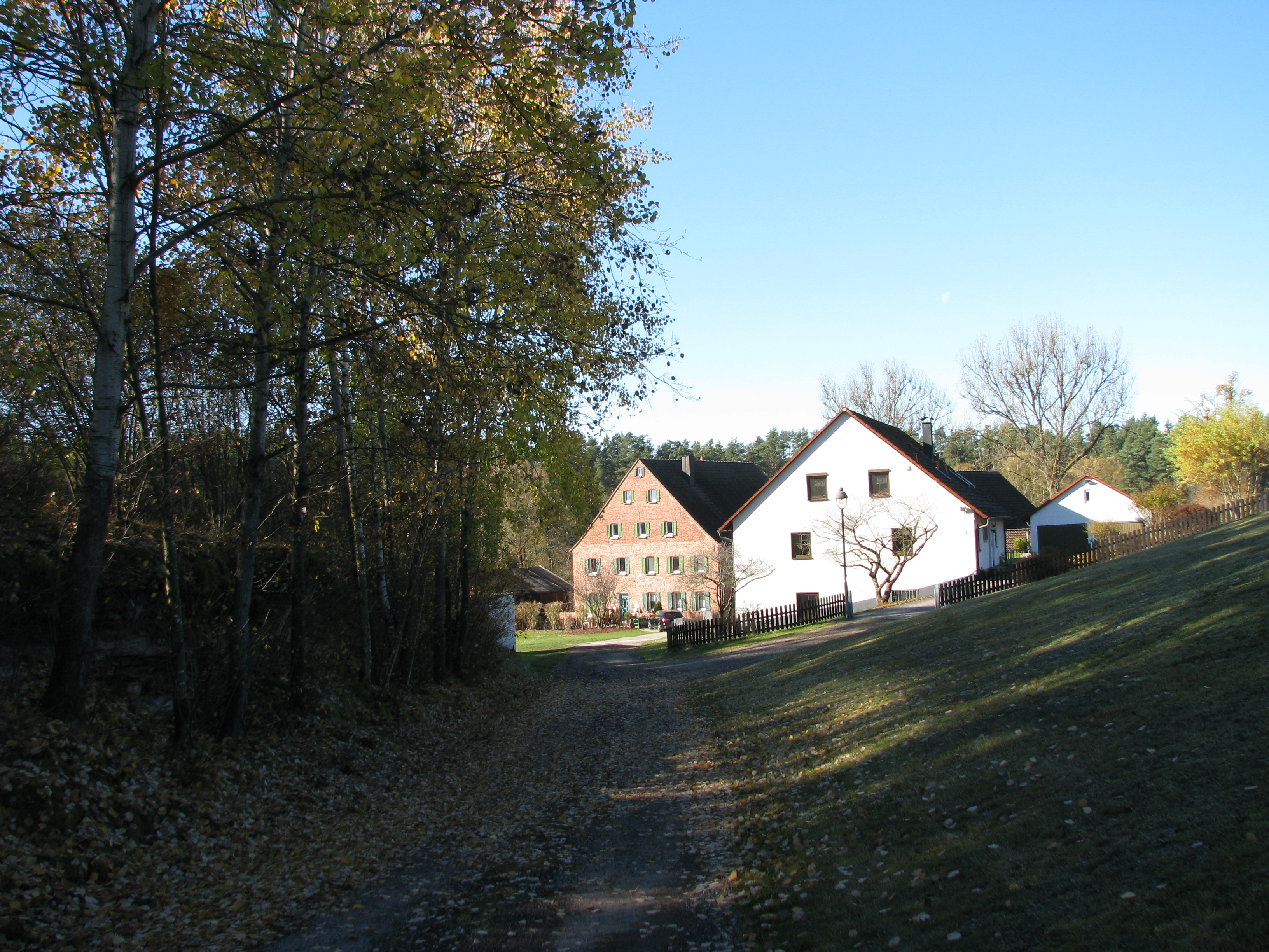 Knabenmühle, Ortsteil von Hilpoltstein im mittelfränkischen Landkreis Roth